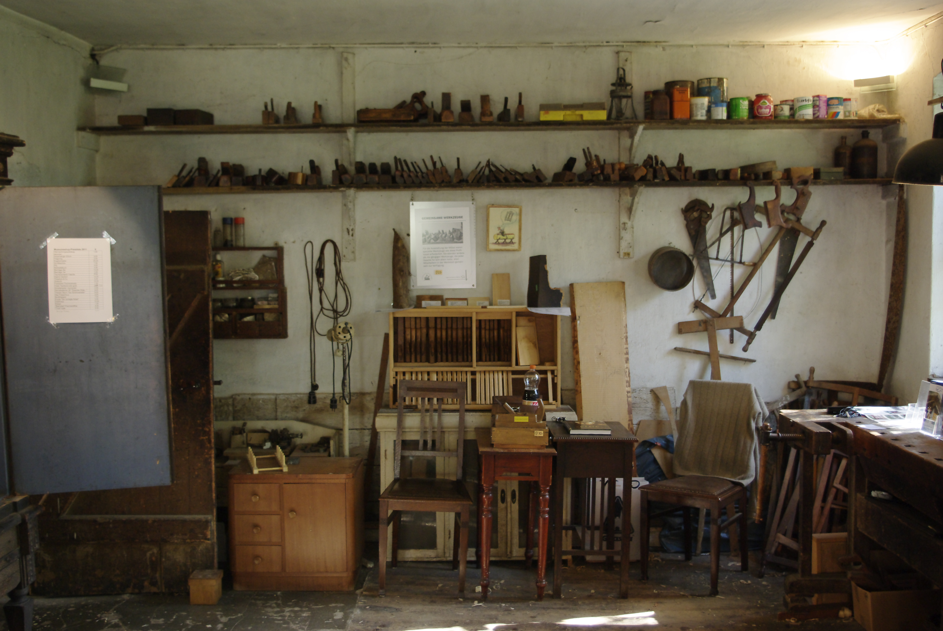 Kulturdenkmale in Friedrichstadt Nummer 60